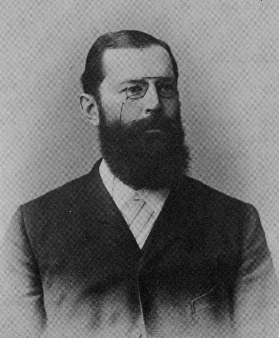 Hermann Emil Fischer (* 9. Oktober 1852 in Euskirchen; † 15. Juli 1919 in Berlin), als neuer Lehrstuhlinhaber am Chem. Institut in Würzburg, Maxstraße (1885-1892).